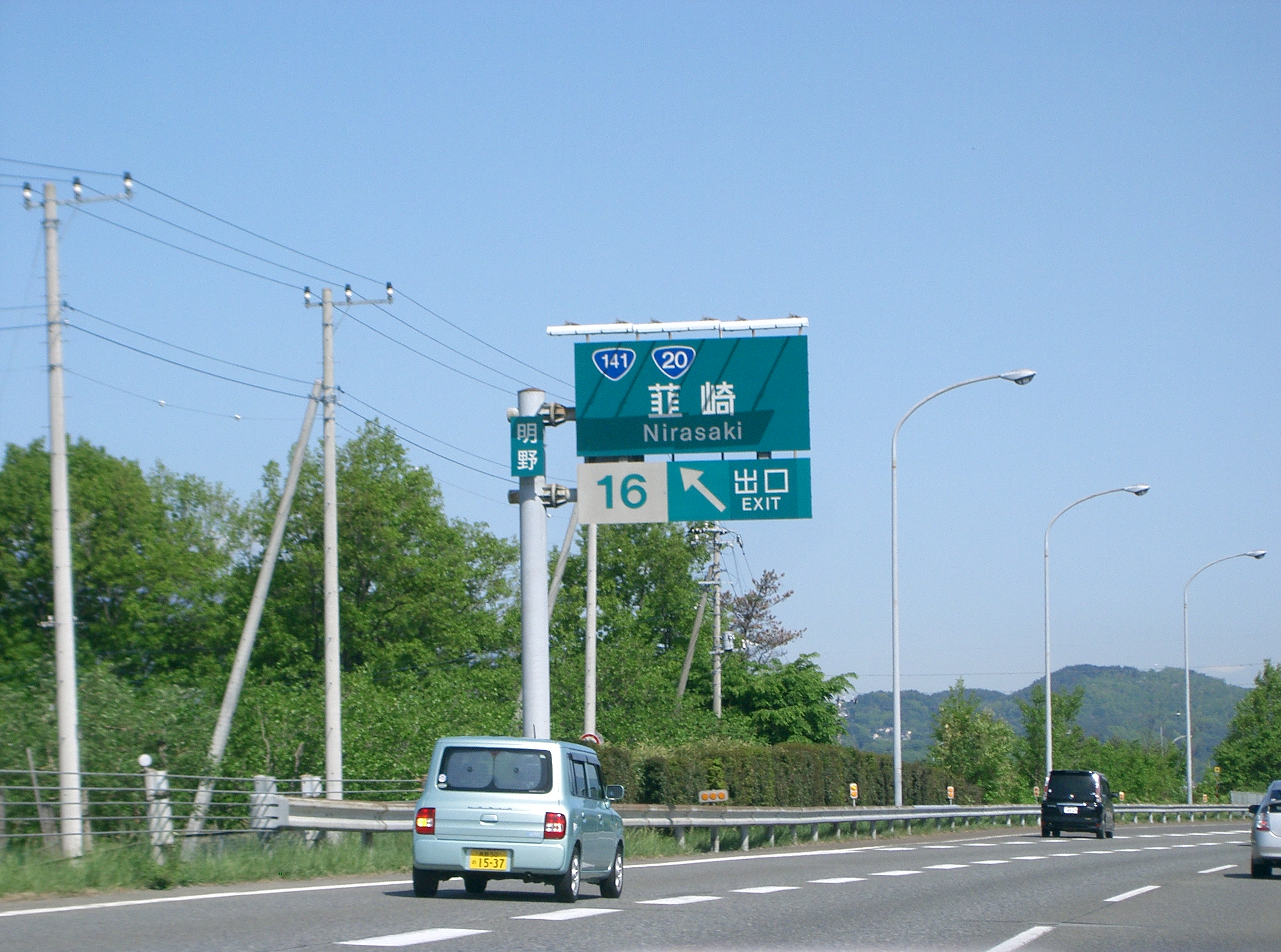 chuo-nirasakiic-K(中央道下り韮崎IC)